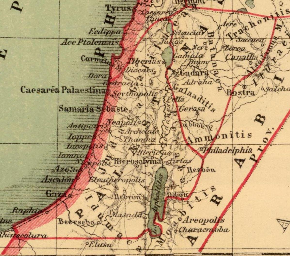 Palastina. Asia citerior. Auctore Henrico Kiepert Berolinensi. Geographische Verlagshandlung Dietrich Reimer (Ernst Vohsen) Berlin, Wilhemlstr. 29. (1903)